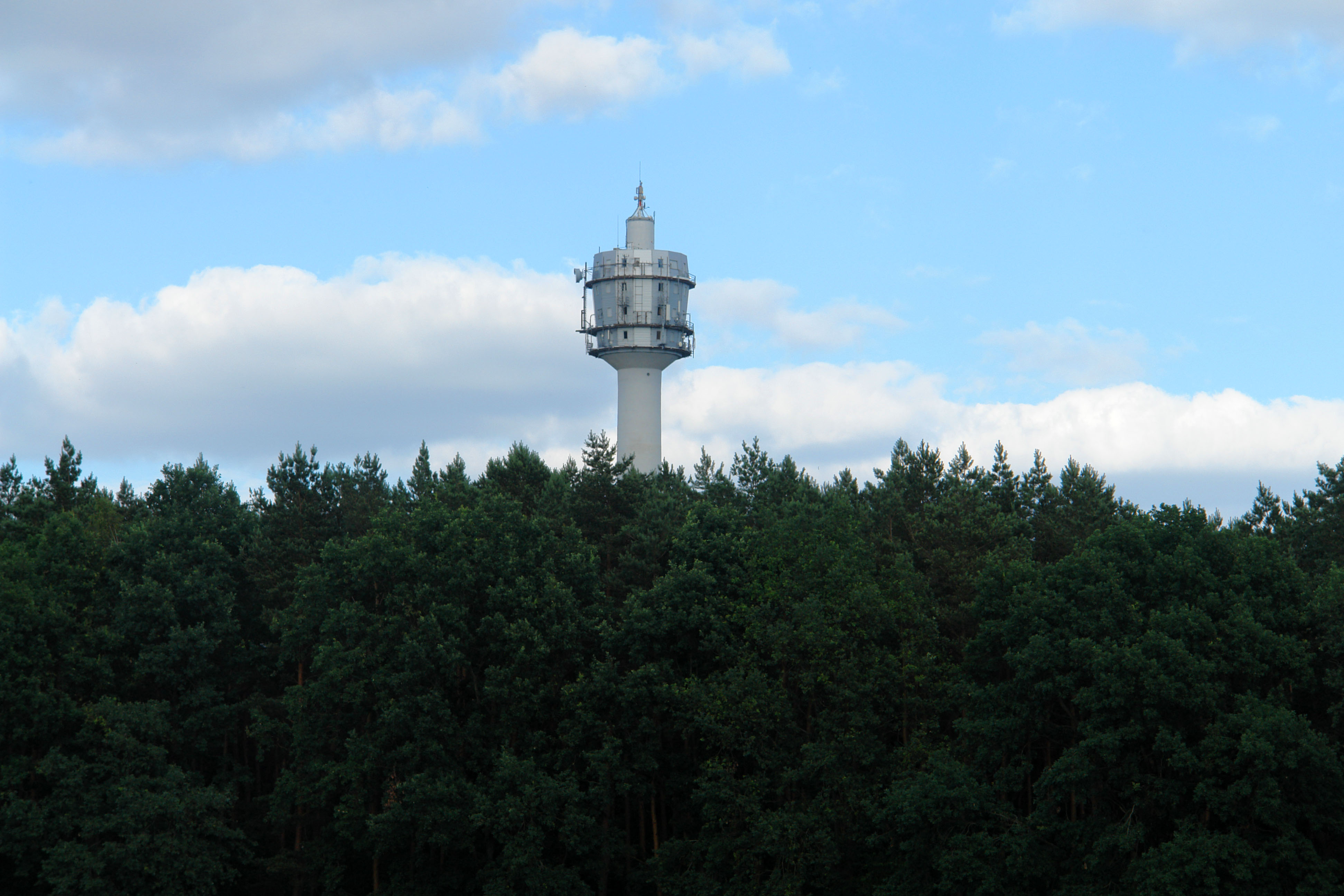 Der Funkturm am Ortseingang von Birkholzaue an der Bernauer Chaussee.